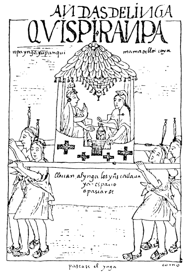 Kallawayas llevando en silla al Inca Tupak Yupanki y a su esposa Mama Occlo-Coya a la corde de Cuzco, por el año1600. Dibujo de Felipe Guamán Poma de Ayala.